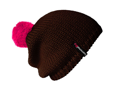 bommelME beanie braun-pink